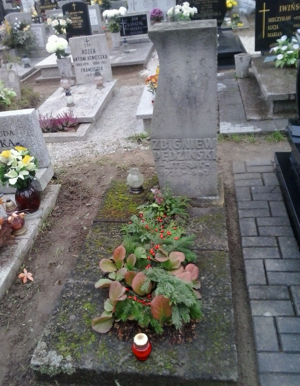 Grób Zbigniewa Pędzińskiego na cm. górczyńskim w Poznaniu.